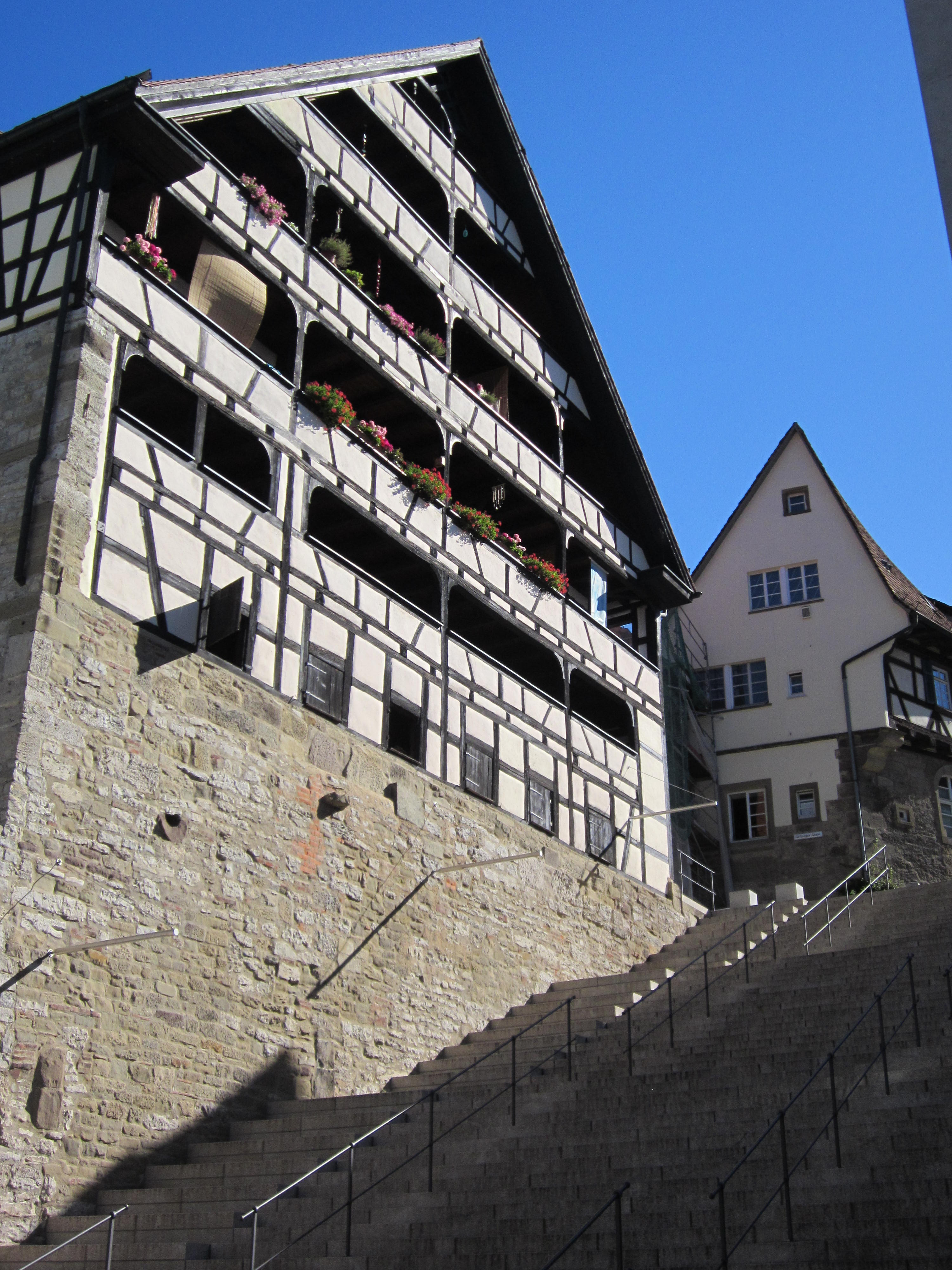 ehemalige Gerberei